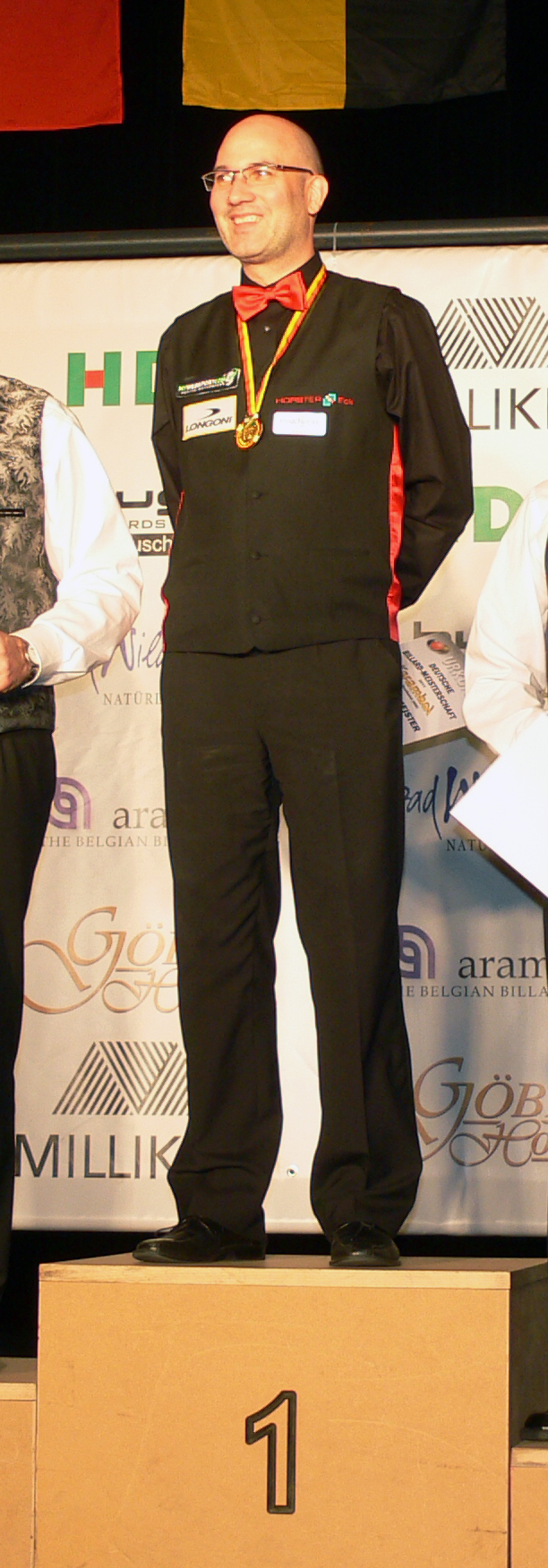 Martin Horn als Sieger auf dem Dreibund-Weltcup in Istanbul 2009 Unknown